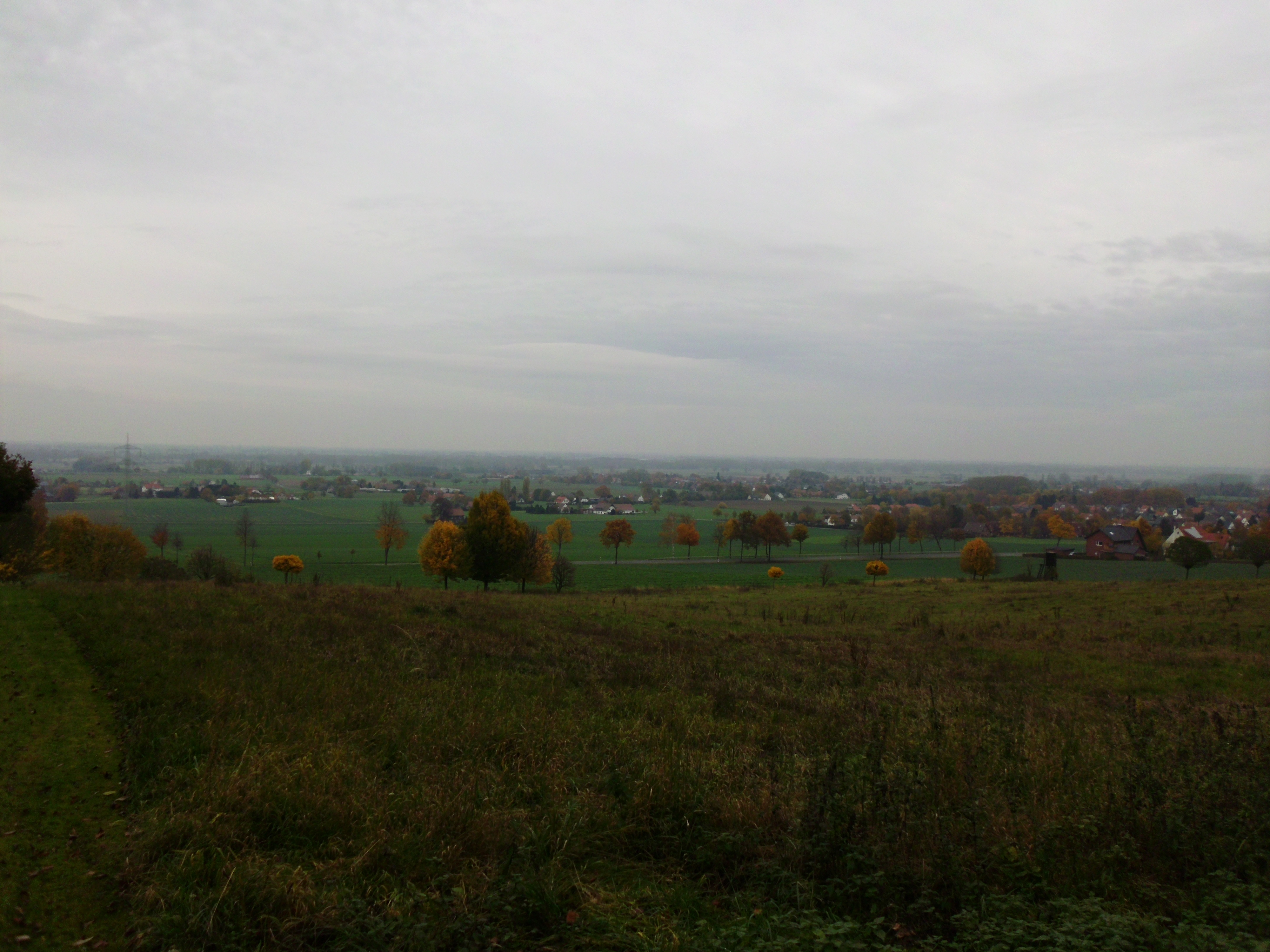 Beginn des Norddeutschen Tieflandes bei Minden vom Wiehengebirge aus gesehen.